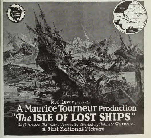 Encart pour The Isle of Lost Ships, film de Maurice Tourneur, paru dans Film Daily en 1923